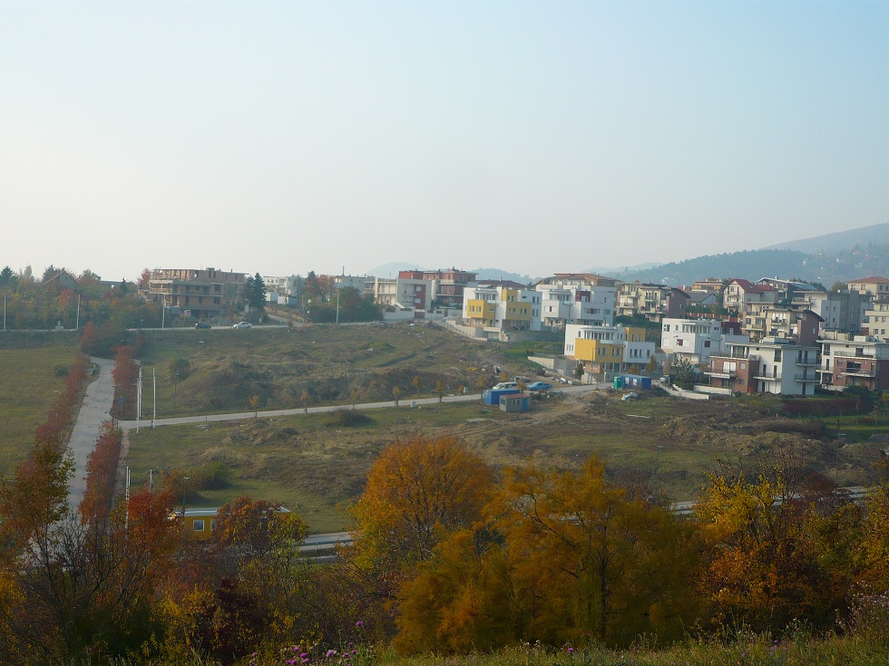 Hosszúrét, Budapest, District XI